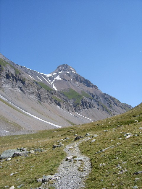 Vallée de la Leisse en direction du Col, surplombée par la Grand Motte.